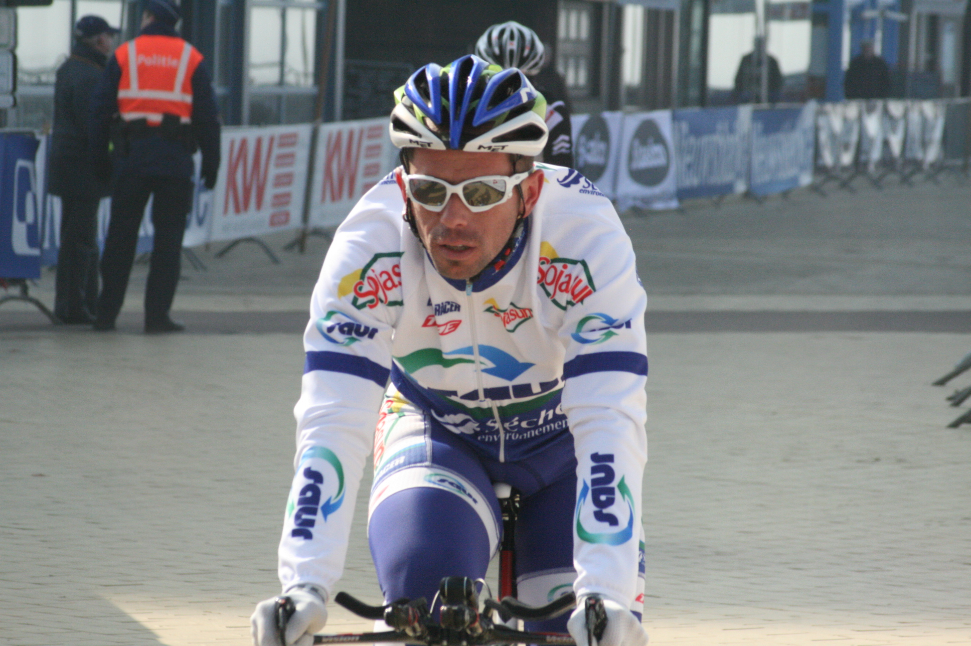 Driedaagse van West-Vlaanderen 2011, proloog in Middelkerke